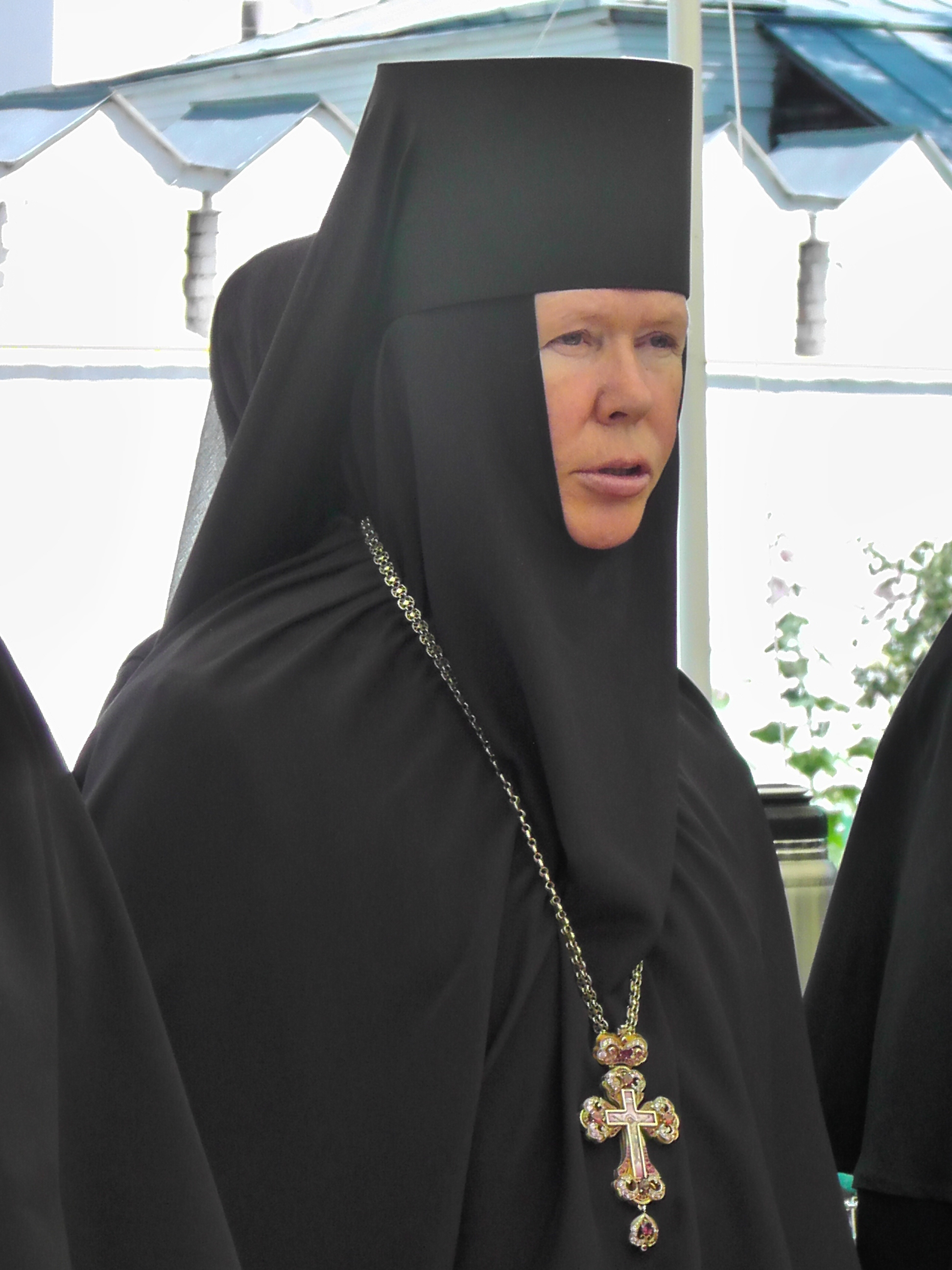 Антония, игуменья Боголюбовского женского монастыря